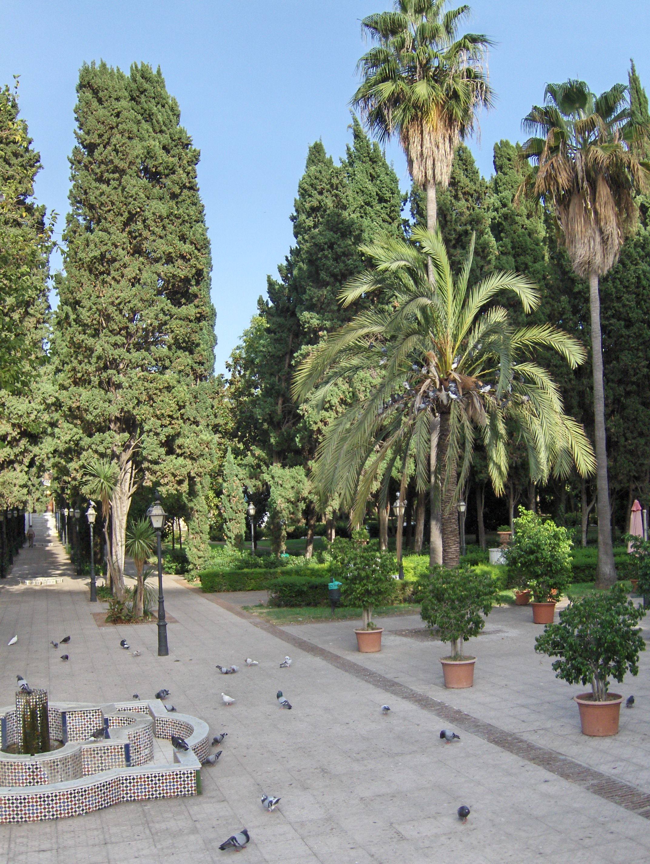 Parque de la Constitución, Marbella, España.